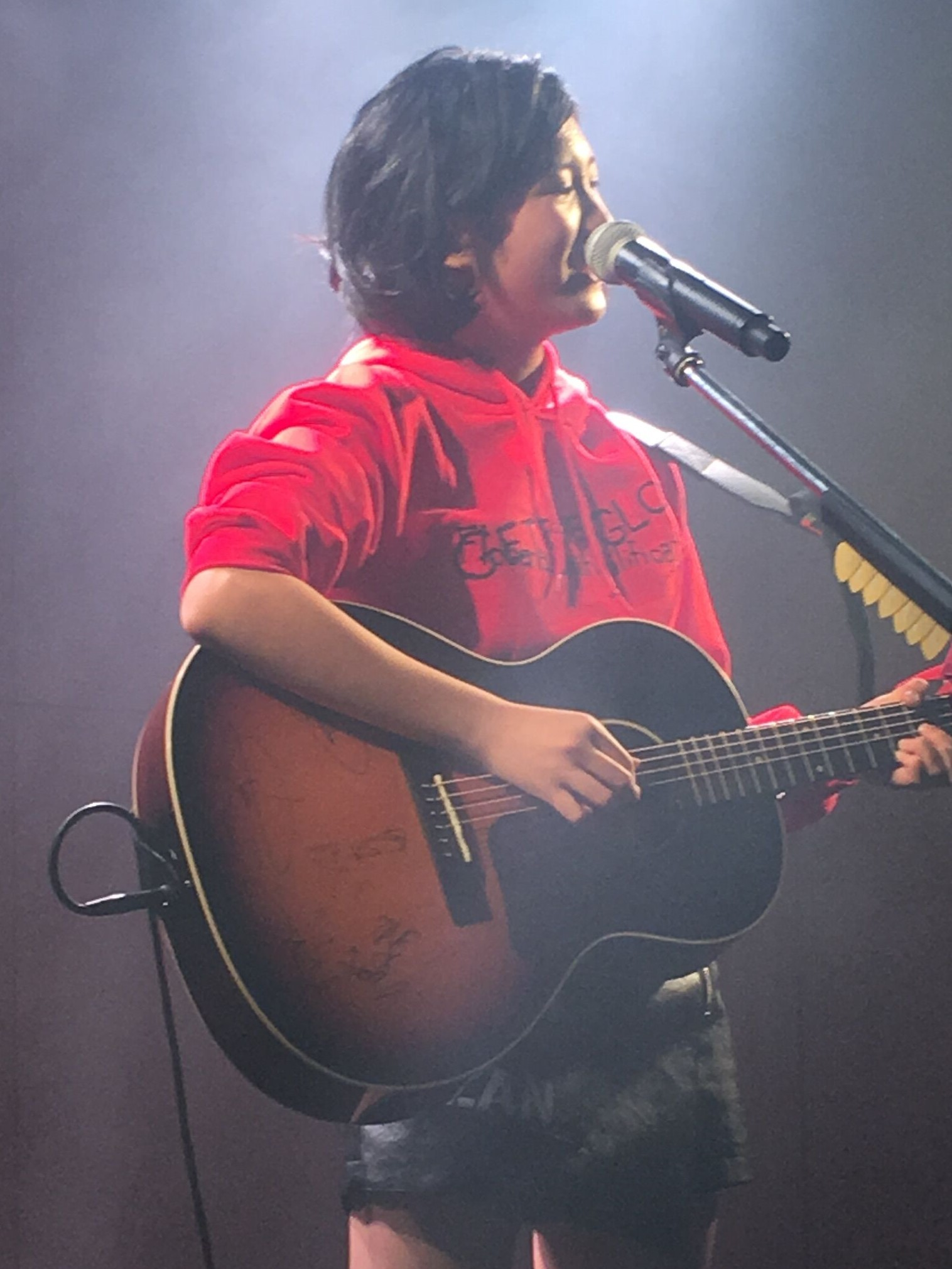 20180121撮影。GETTHEGLORY（表参道WAL&WALL）にて